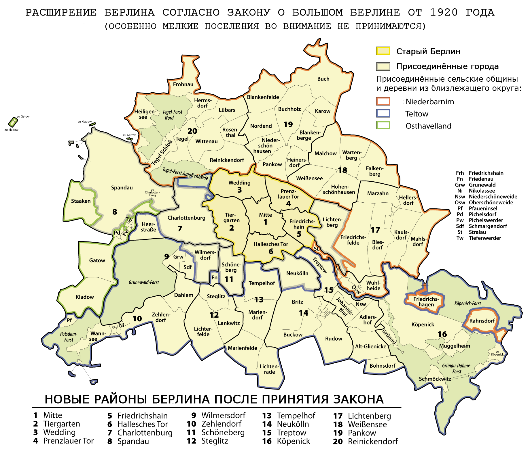 Karte: Die Erweiterung Berlins durch das Groß-Berlin-Gesetz von 1920